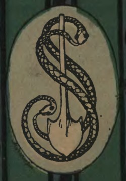 Эмблема литературного кружка первой половины XIX в.